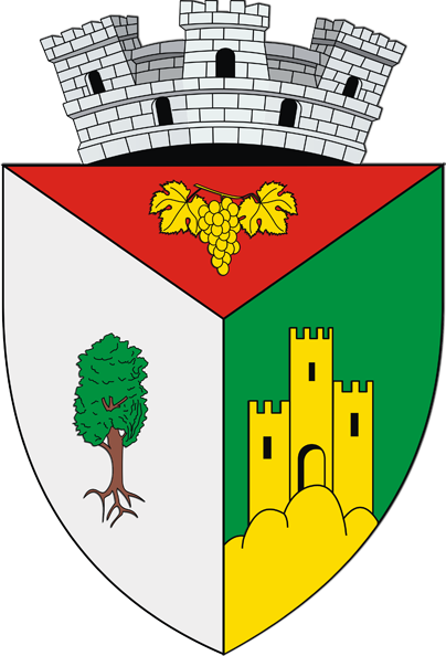 Coat of arms of Babadag, Romania Descrierea stemei: Stema oraşului Babadag se compune dintr-un scut triunghiular cu marginile rotunjite, împărţit în formă de furcă. În prima partiţie, pe fond roşu, se află un strugure, cu o crenguţă şi două frunze, de aur. În câmpul din dreapta, pe fond argintiu, se află un arbore dezrădăcinat, în culoare naturală. În câmpul din stânga, pe fond albastru, se află o cetate de argint, cu trei turnuri inegale, aşezate pe patru dealuri, de aur. Scutul este trimbrat de o coroană murală de argint, cu trei turnuri crenelate. Semnificaţia elementelor însumate: Strugurele şi arborele sunt simbolul bogăţiei zonei, vestită prin podgorii şi păduri. Cetatea aşezată pe dealuri a figurat în stema interbelică a localităţii, făcând trimitere la stăpânirea romană din zonă, prima atestare documentară datând din anul 1262. Coroana murală cu trei turnuri crenelate semnifică faptul că localitatea are rangul de oraş.